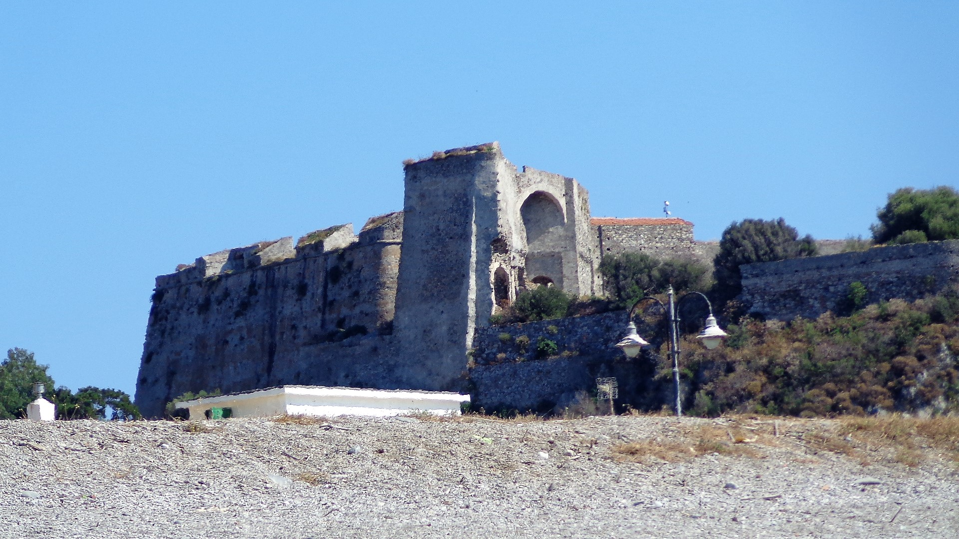 castello di Milazzo This is a photo of a monument which is part of cultural heritage of Italy.